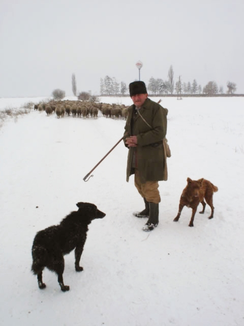 Sheperd's Herd